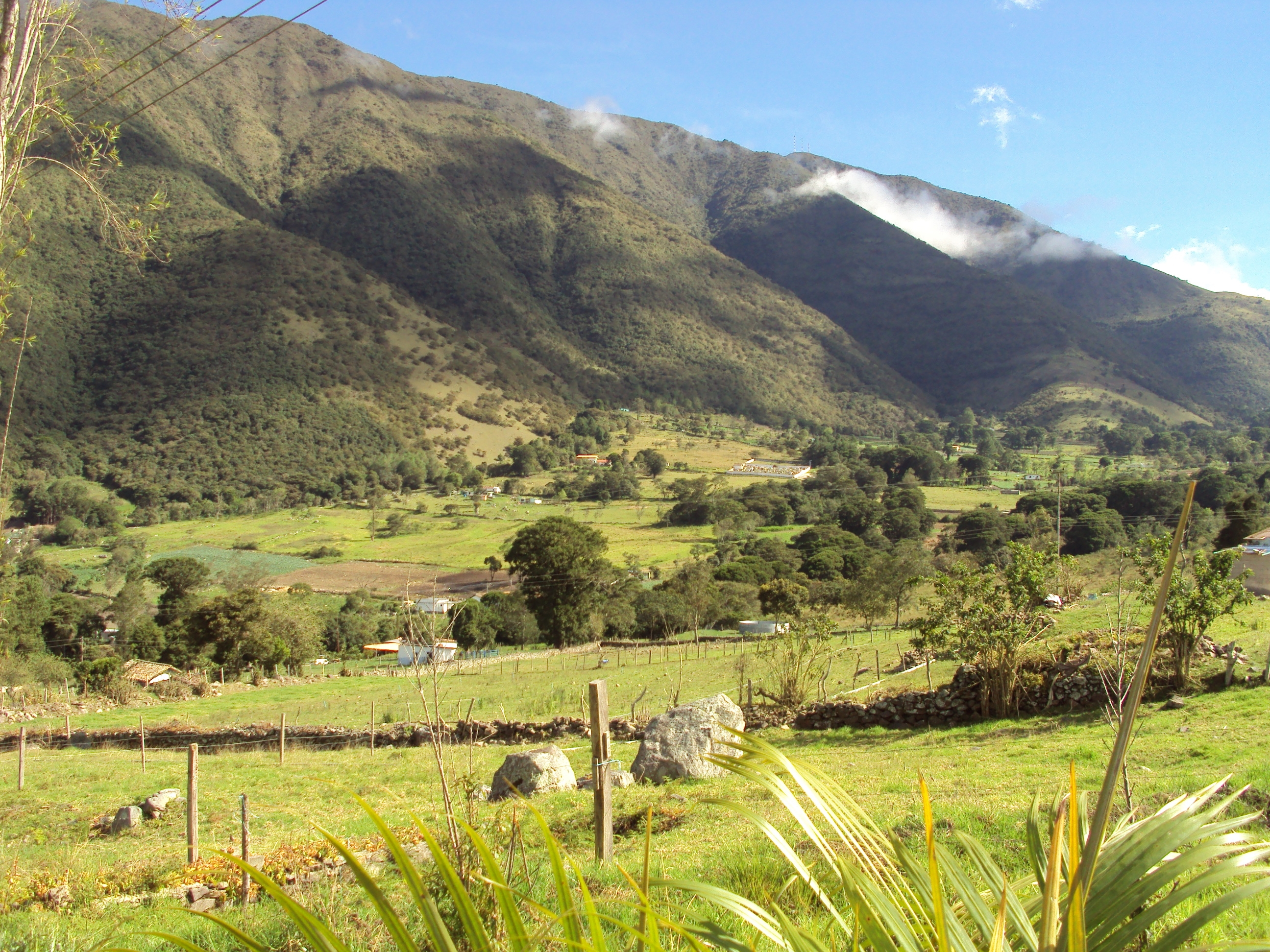 Sabana Gande, Tachira